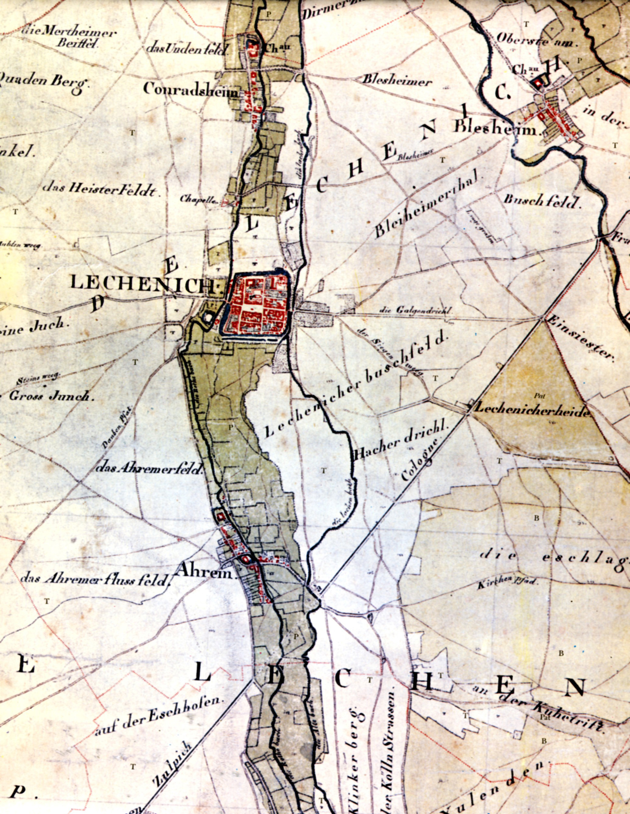 Kartenaufnahme der Rheinlande, Tranchot und von Müffling 1803-1820. Ausschnitt Lechenich und Umgebung